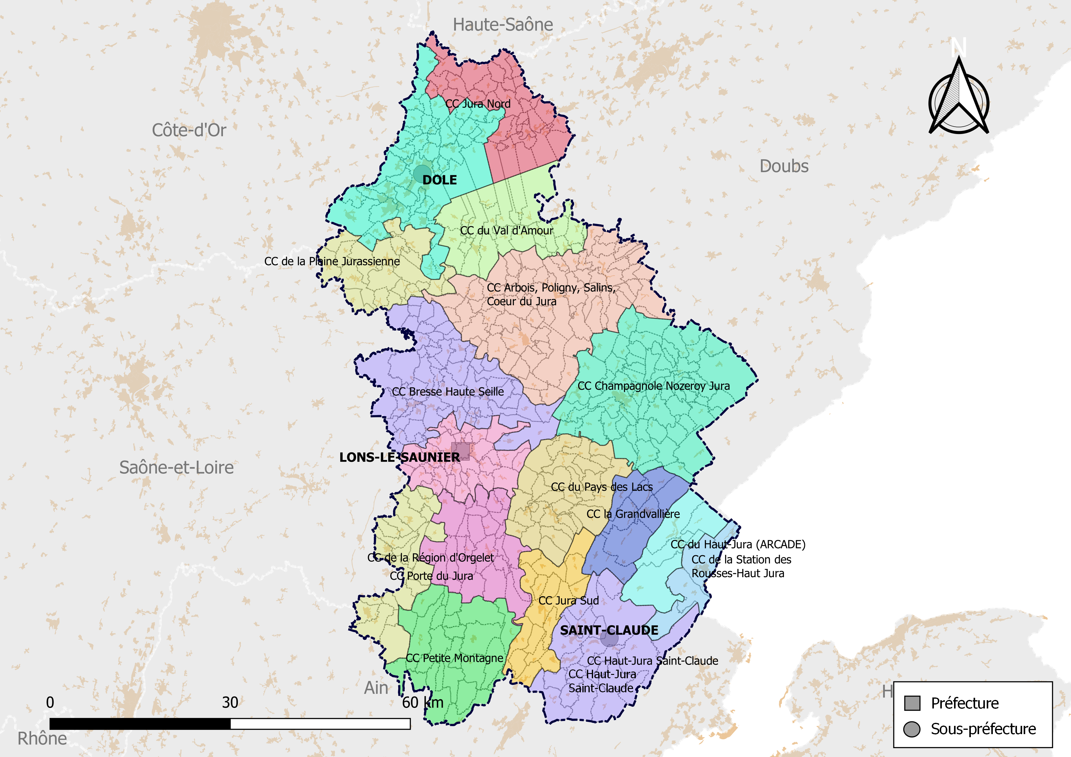 Carte des intercommunalités du département du Jura, France. Composition au 1er janvier 2019.